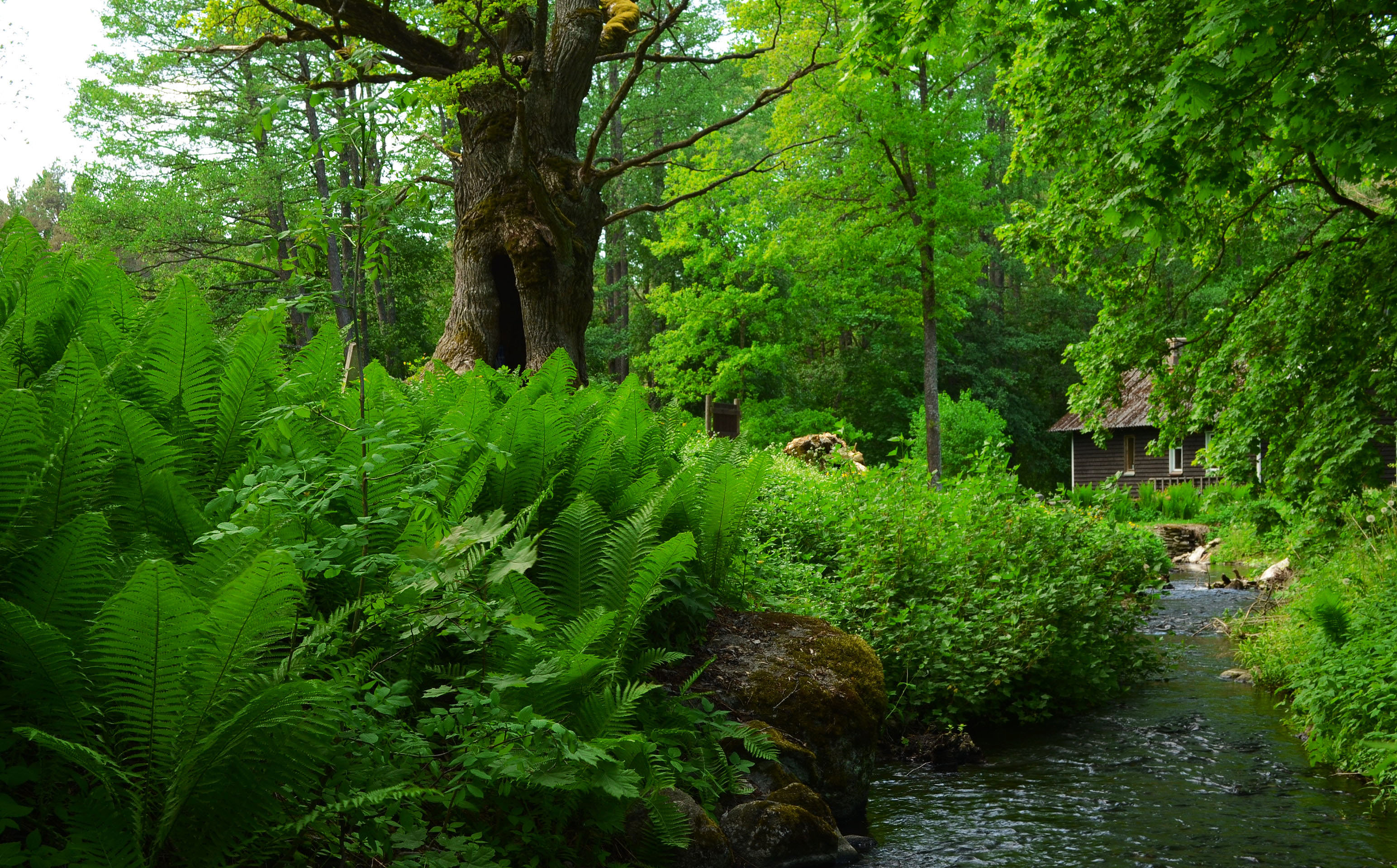 Tülivere hiietamm koos kõrval asuva Tülivere ojaga.